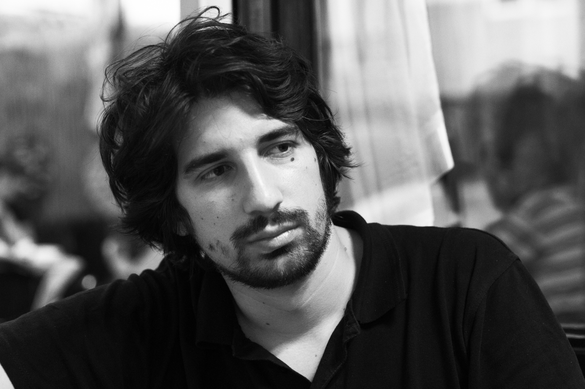 Srpskohrvatski / српскохрватски: Marko Bačanović